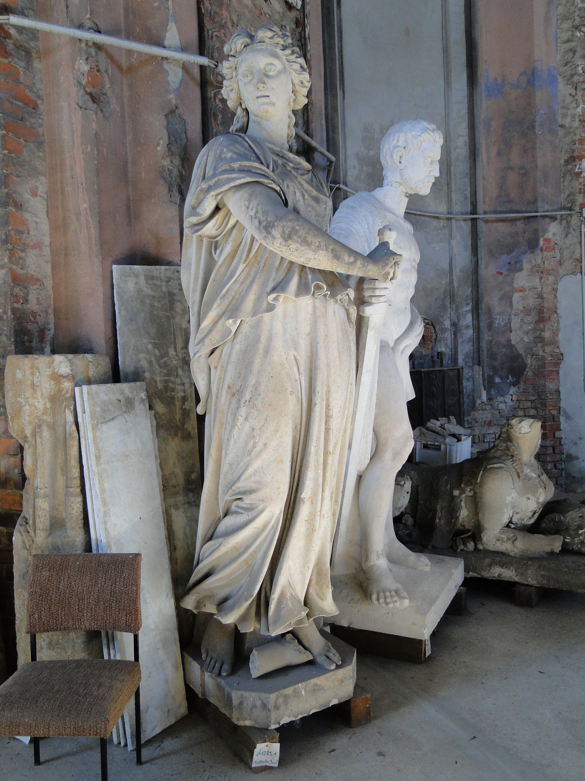 Fassadenfigur Tanz vom Albert-Theater Dresden; heute Lapidarium Zionskirche (Dresden)